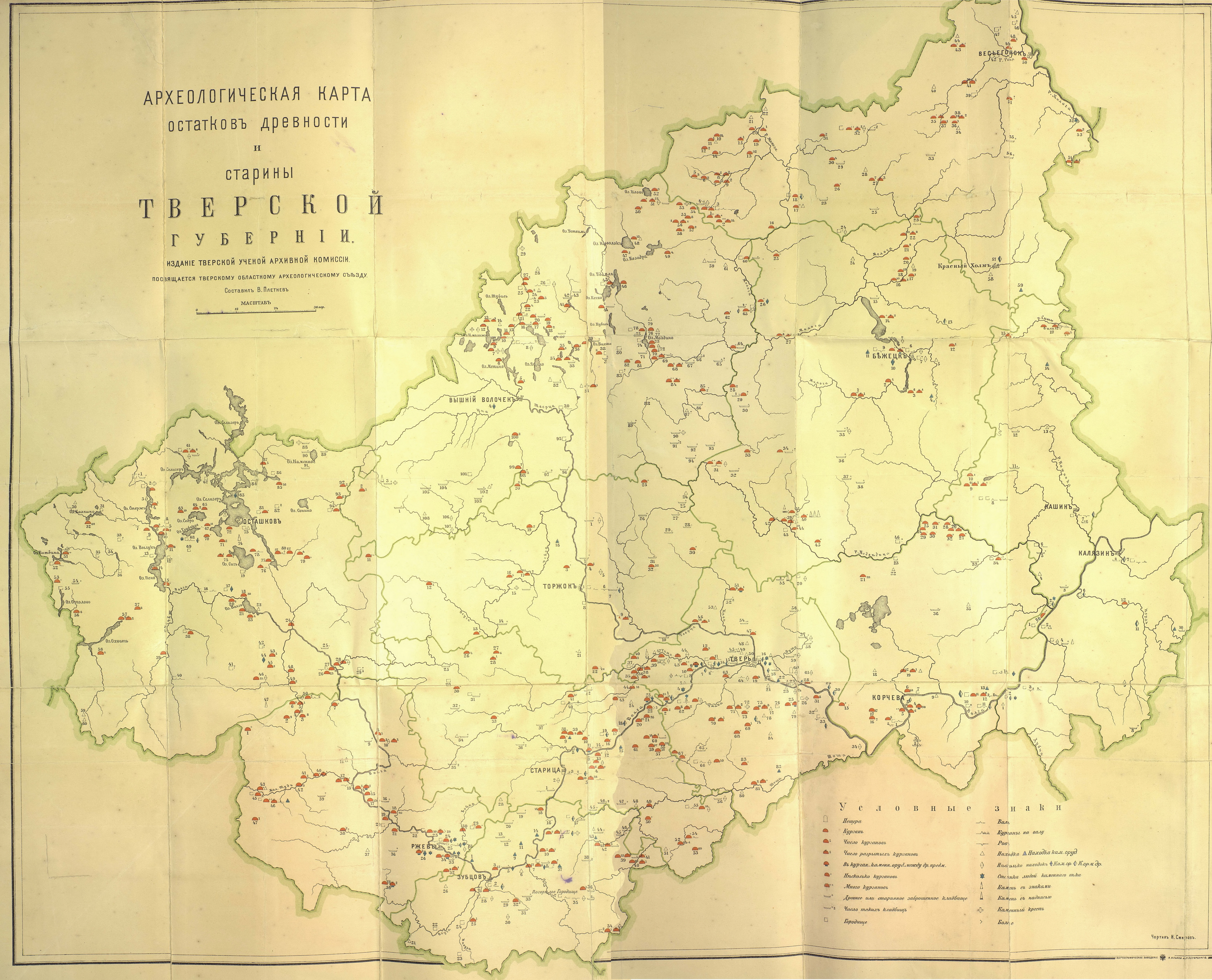 "Археологическая карта остатков древности и старины Тверской губернии". Плетнев В.А. "Об остатках древности и старины в Тверской губернии". - Тверь, 1903